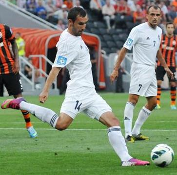 Александру Дандя — румунський футболіст, під час виступів за Говерлу